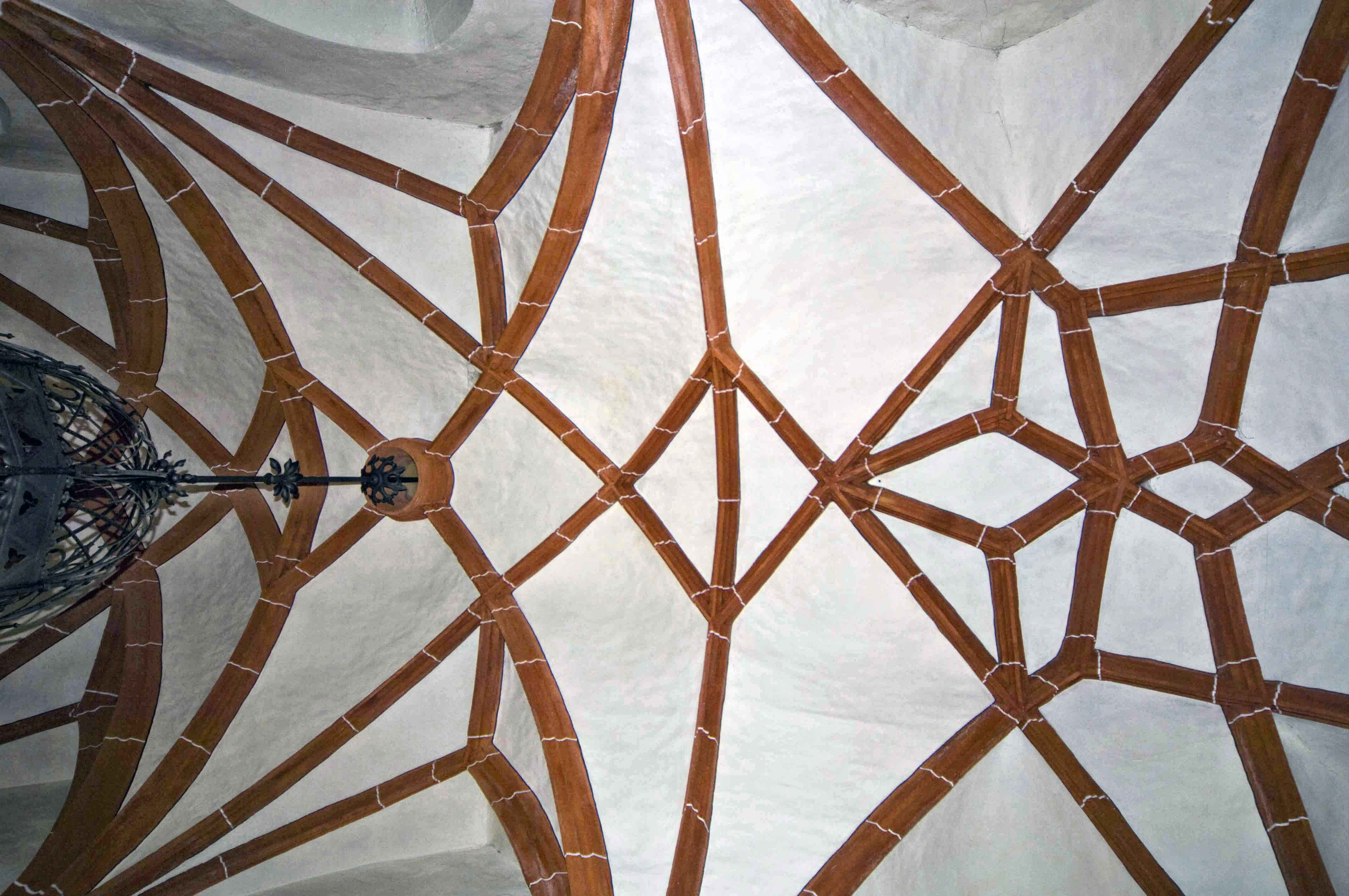 Netzgwölbe der Schrebitzer Kirche